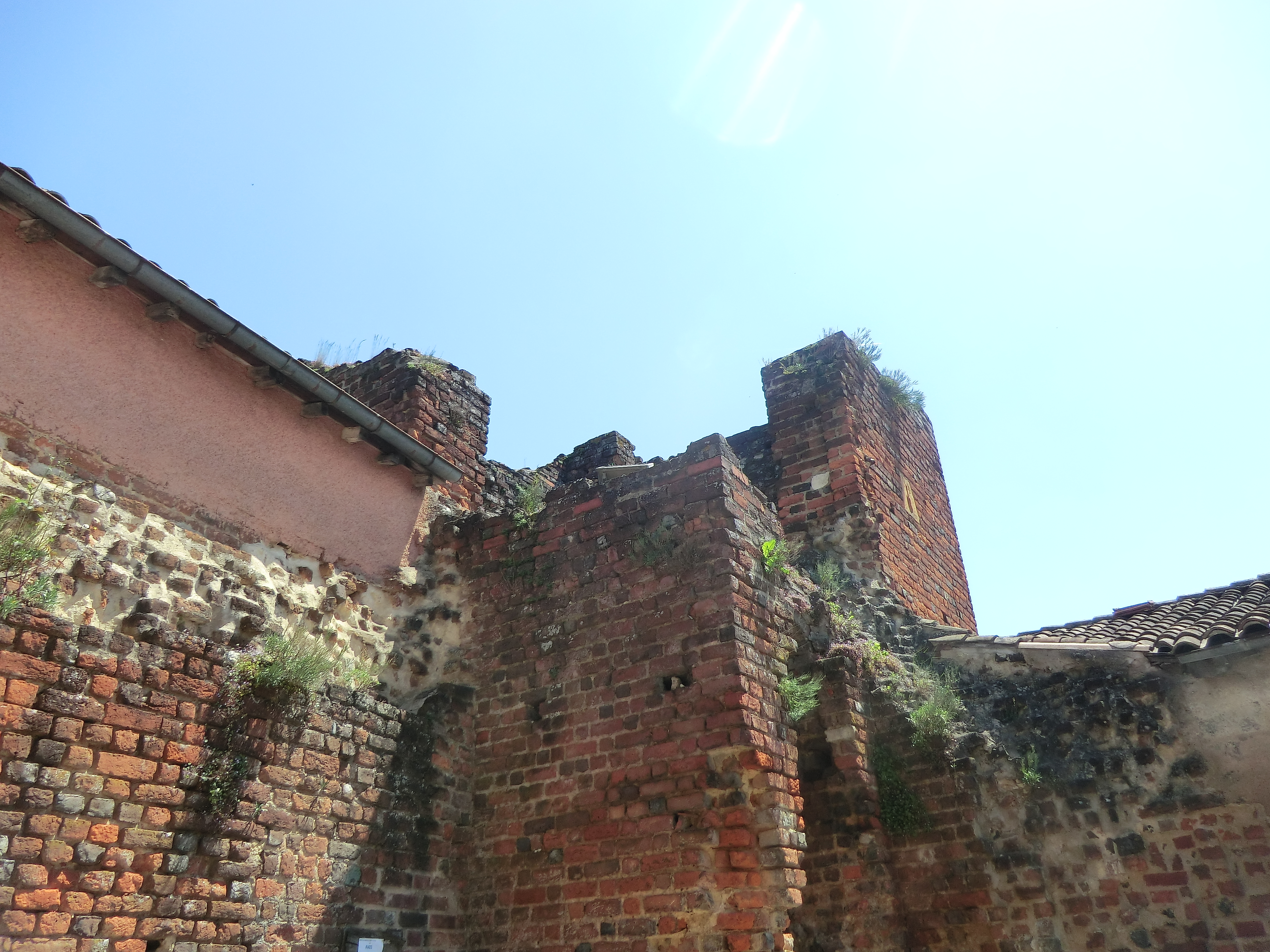 Château d'Ambérieux-en-Dombes - ruines.